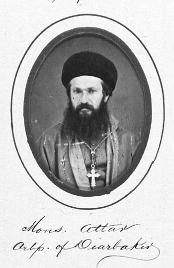 Chaldäisch-katholischer Erzbischof Timotheus Attar von Diyarbakır, Türkei (1832-1891)